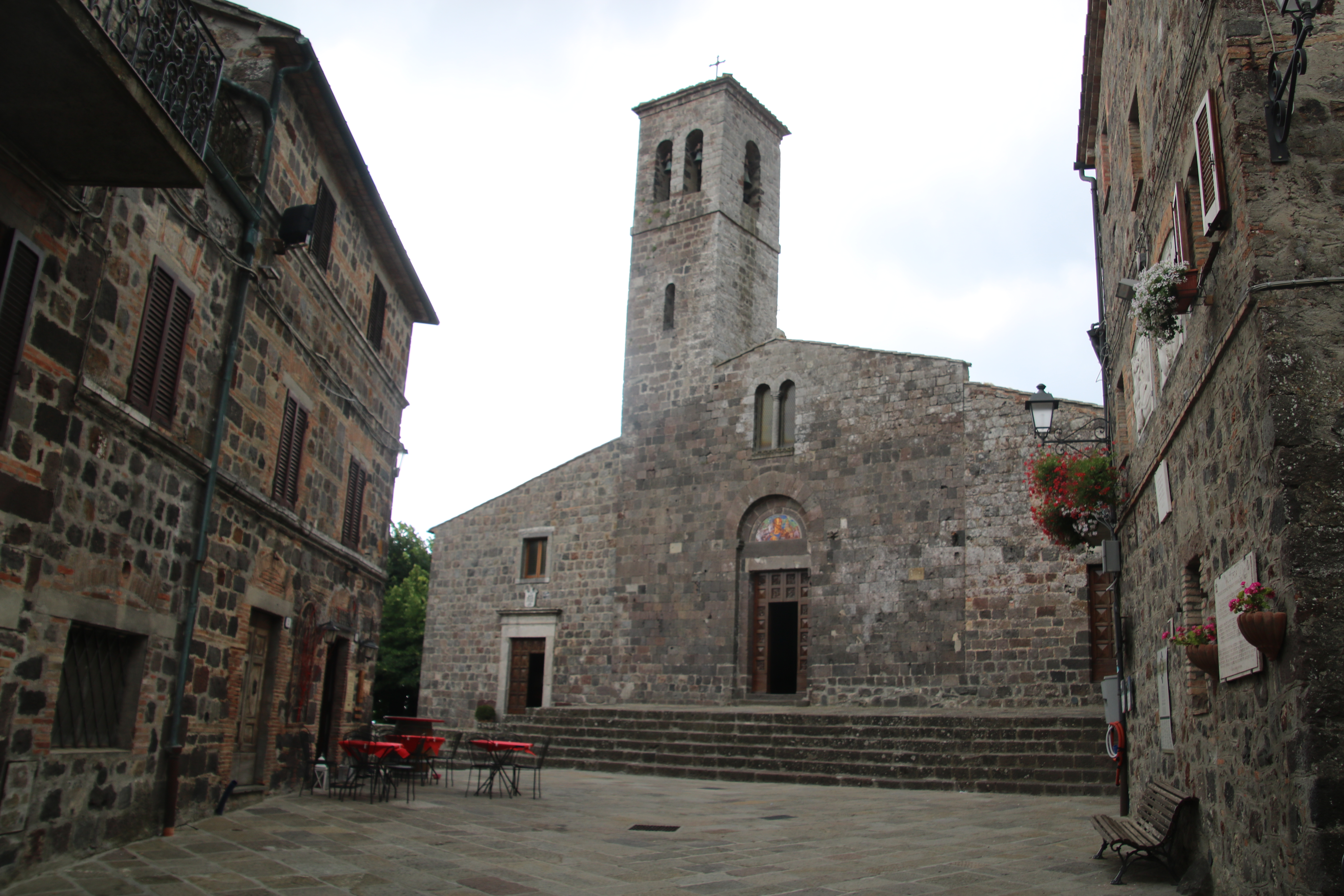 Pieve di San Pietro, Radicofani